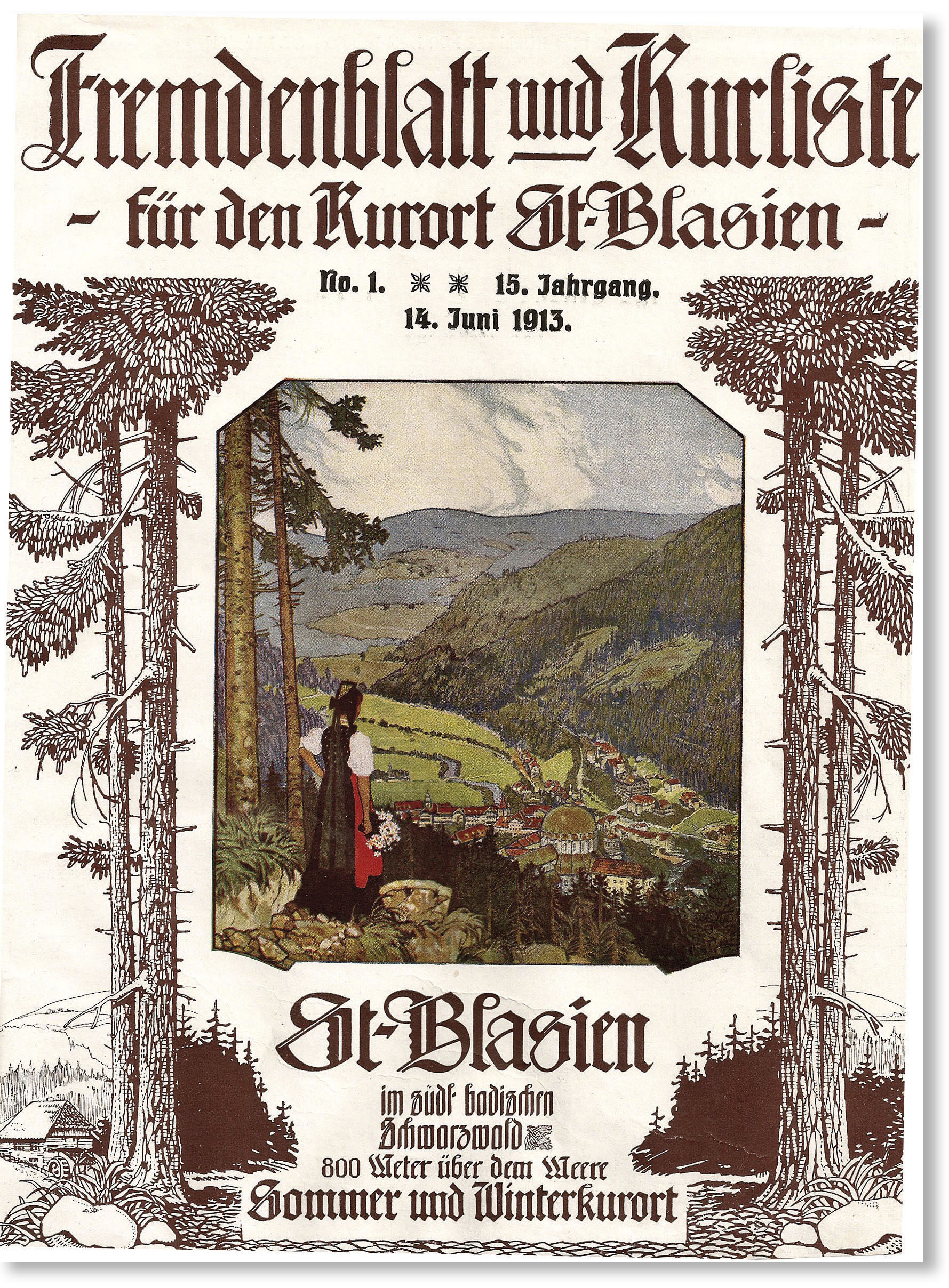 St. Blasien